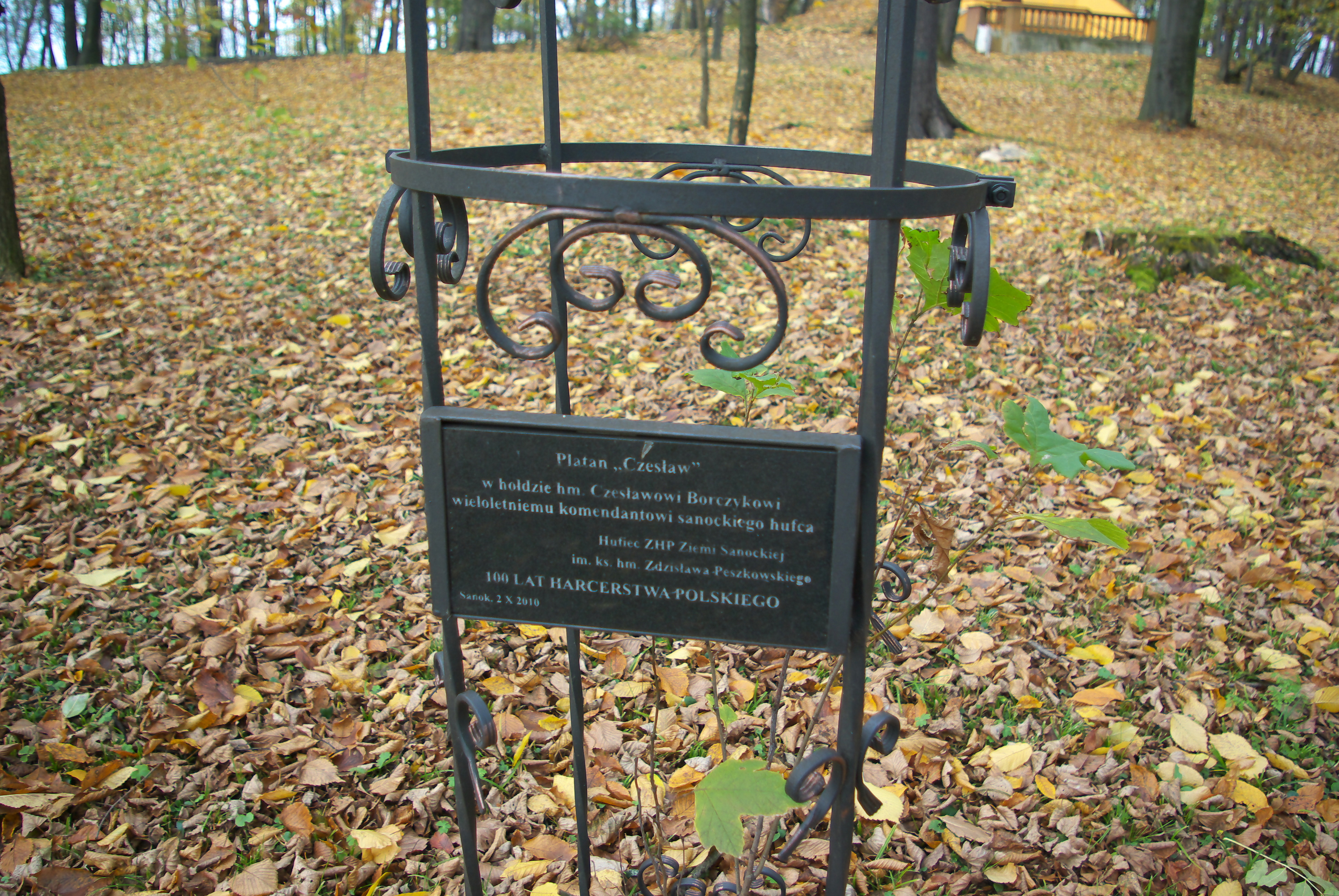 Platan "Czesław" poświęcony Czesławowi Borczykowi w parku miejskim im. Adama Mickiewicza w Sanoku